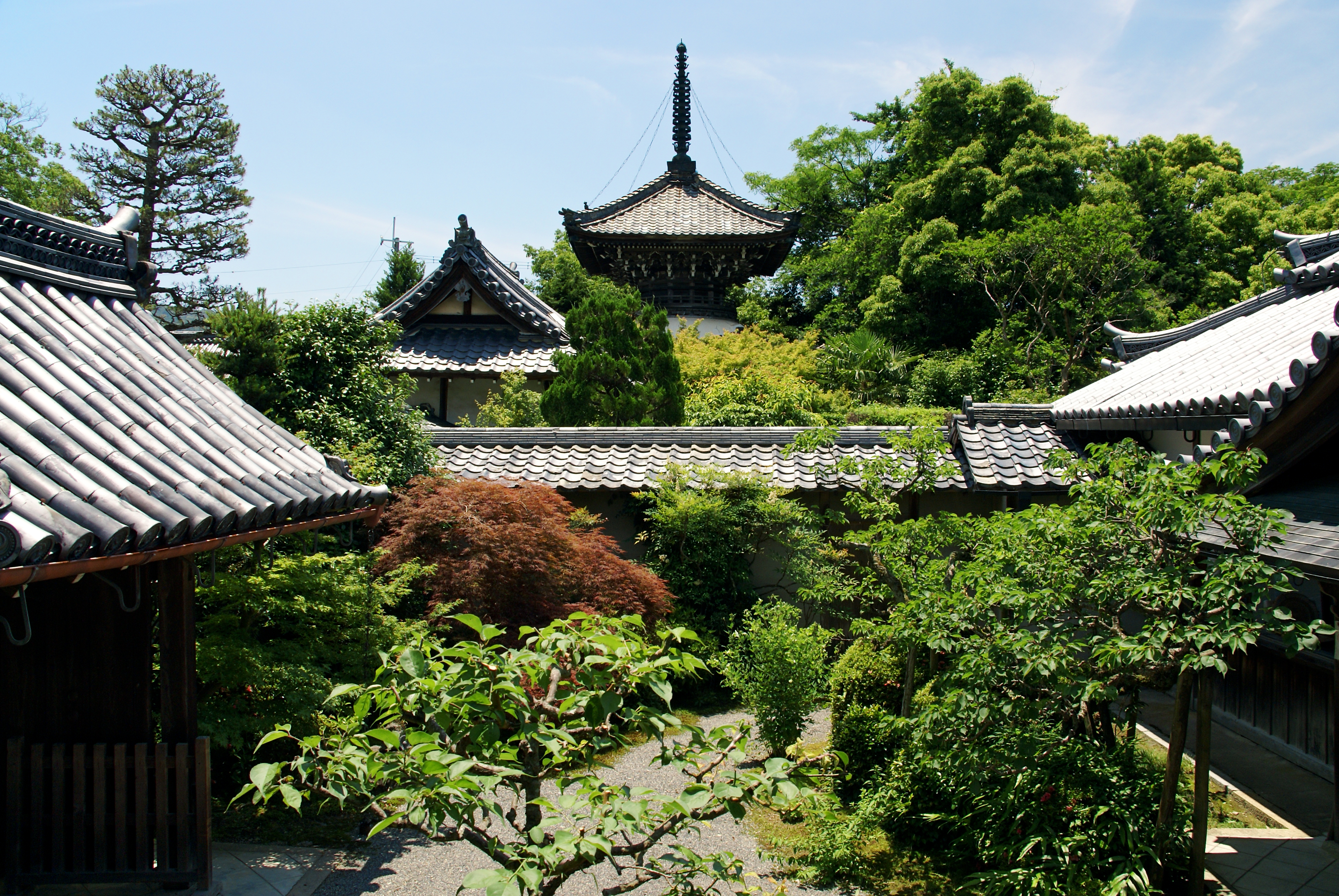 Anaoji in Kameoka, Kyoto prefecture, Japan